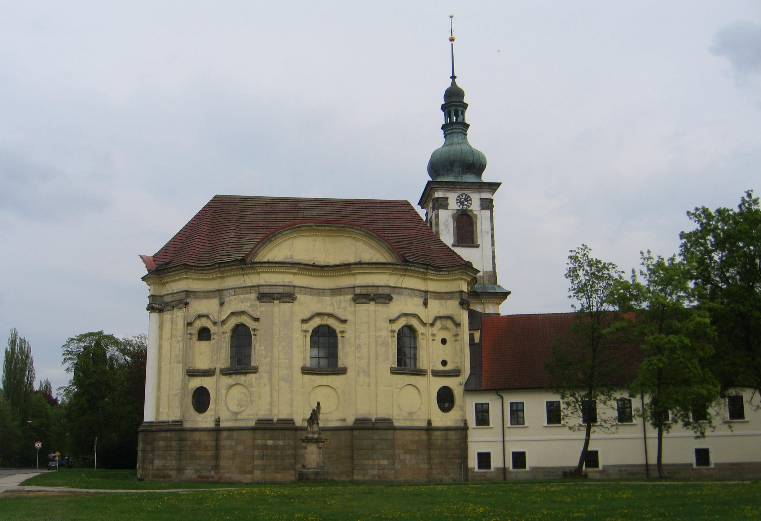 Zámek Smiřice, Smiřice 130